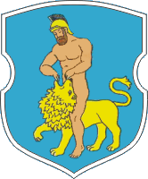 Герб города Себеж 1623 года